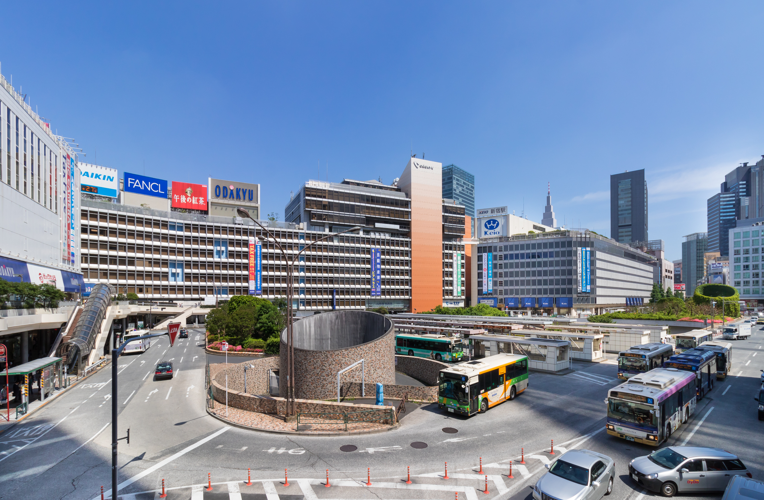 西新宿ロータリー